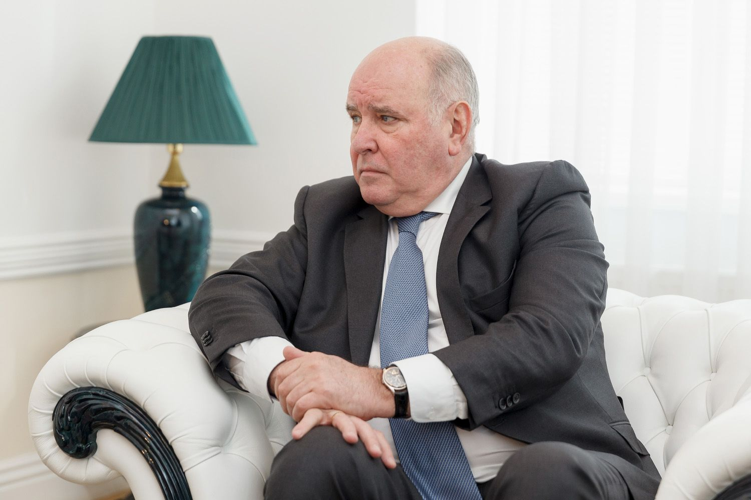 Григорий Борисович Карасин (род.1949) — российский дипломат